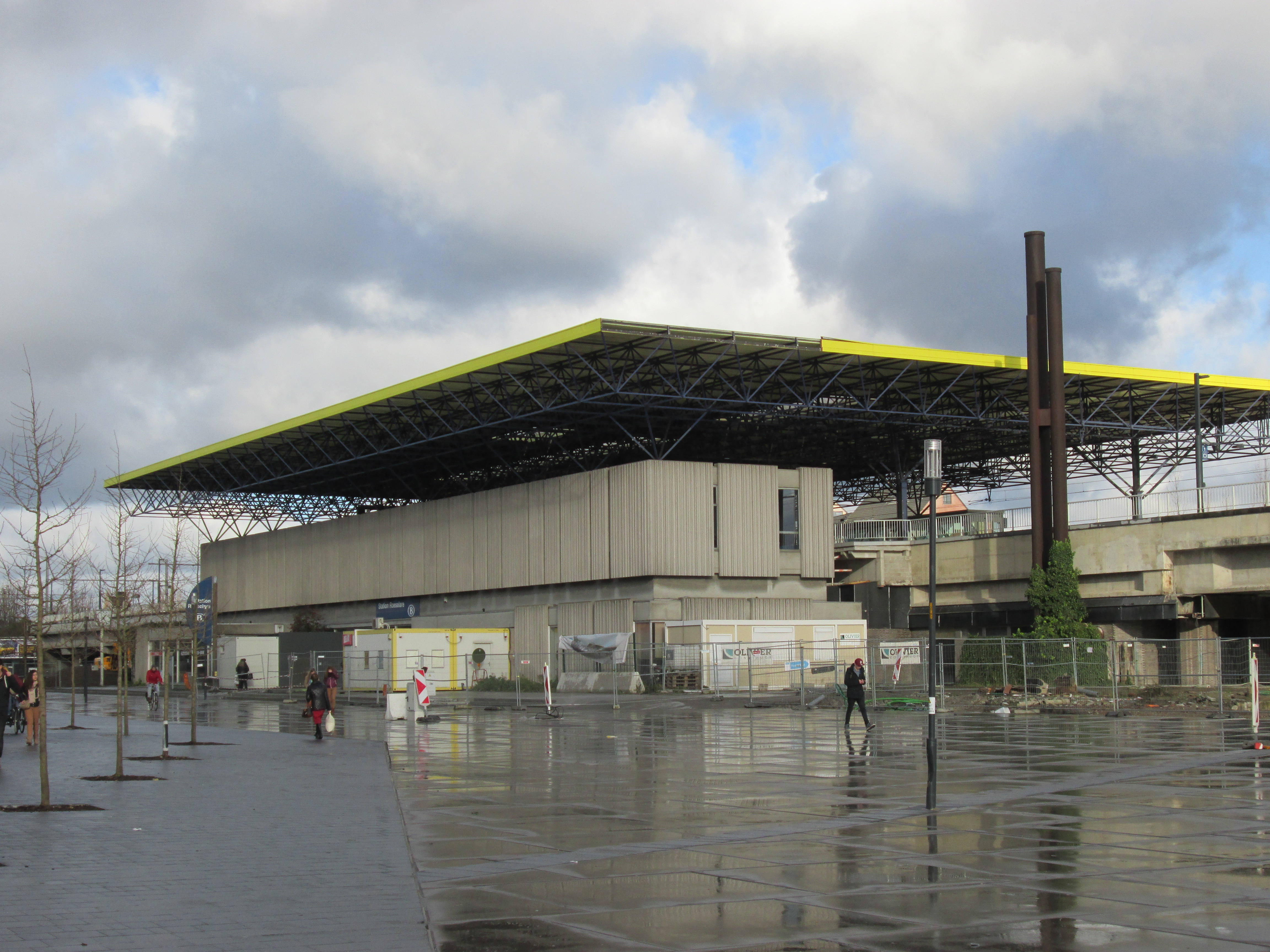 Vanaf 4 februari 2013 zijn auto's niet meer toegelaten op het Stationsplein. Het plein wordt volledig heraangelegd.